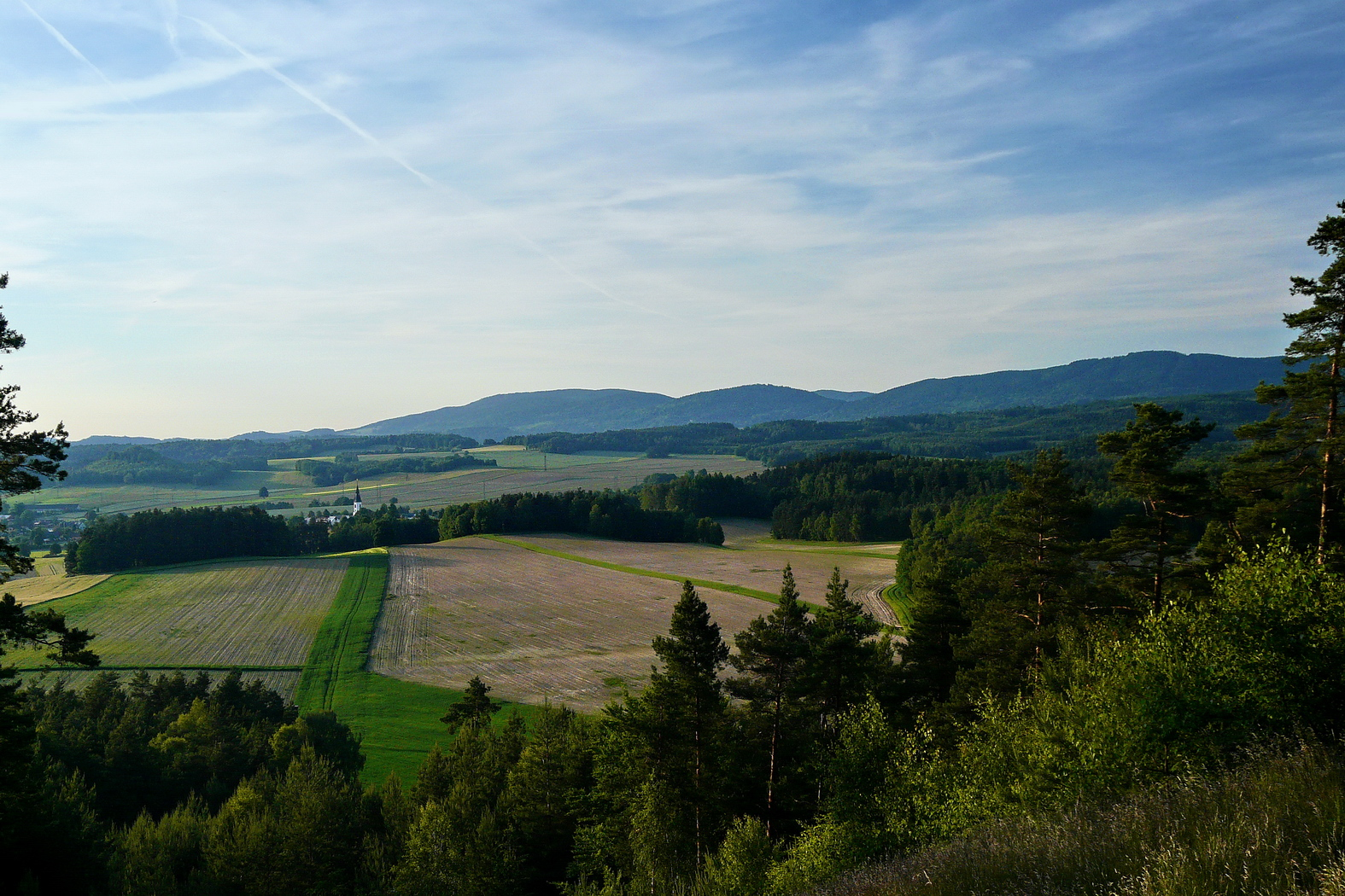 Kryštofovy hřbety a Osečná ze Zábrdského kopce